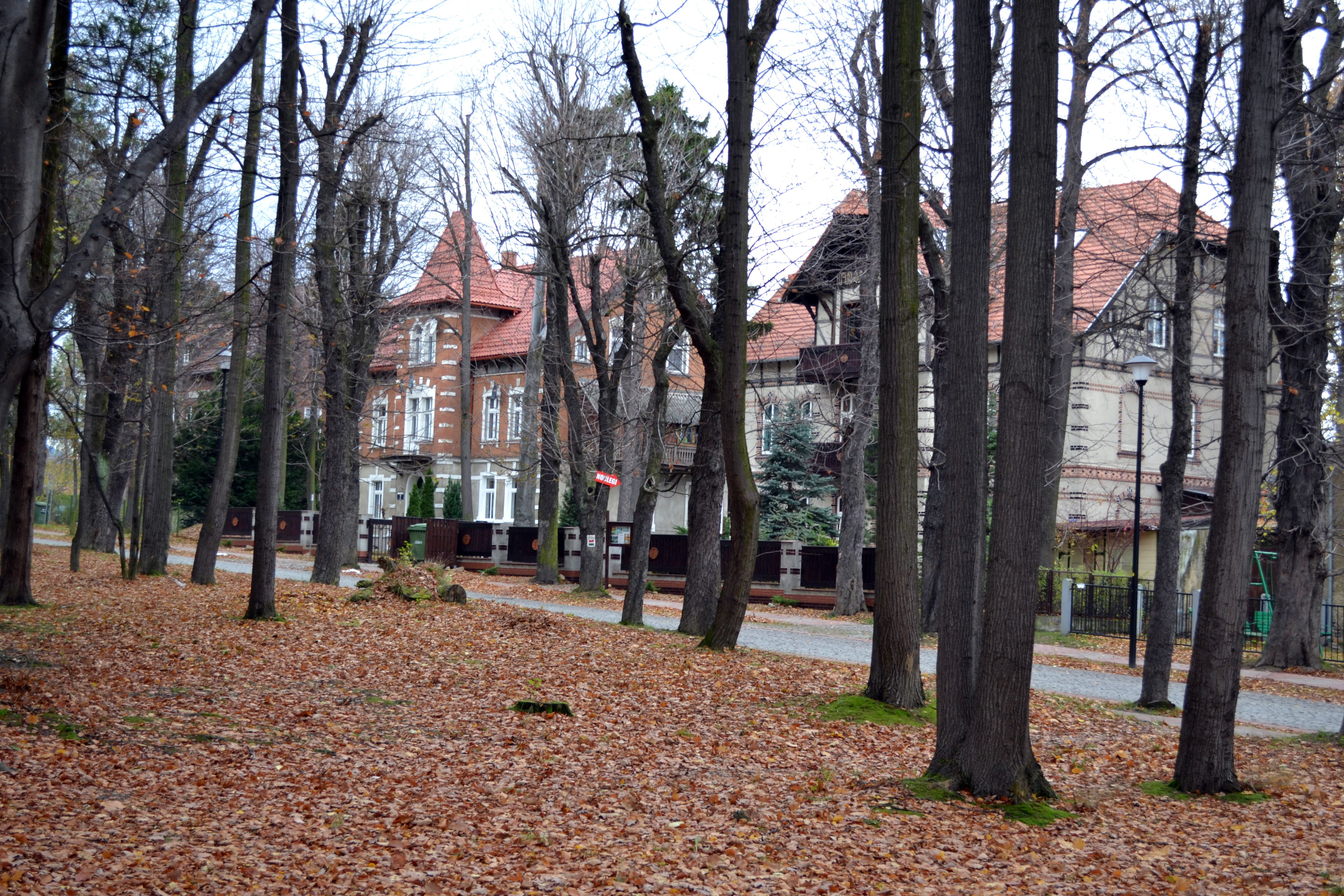 Szczawno-Zdrój, park Szwedzki, 1 ćw. XX